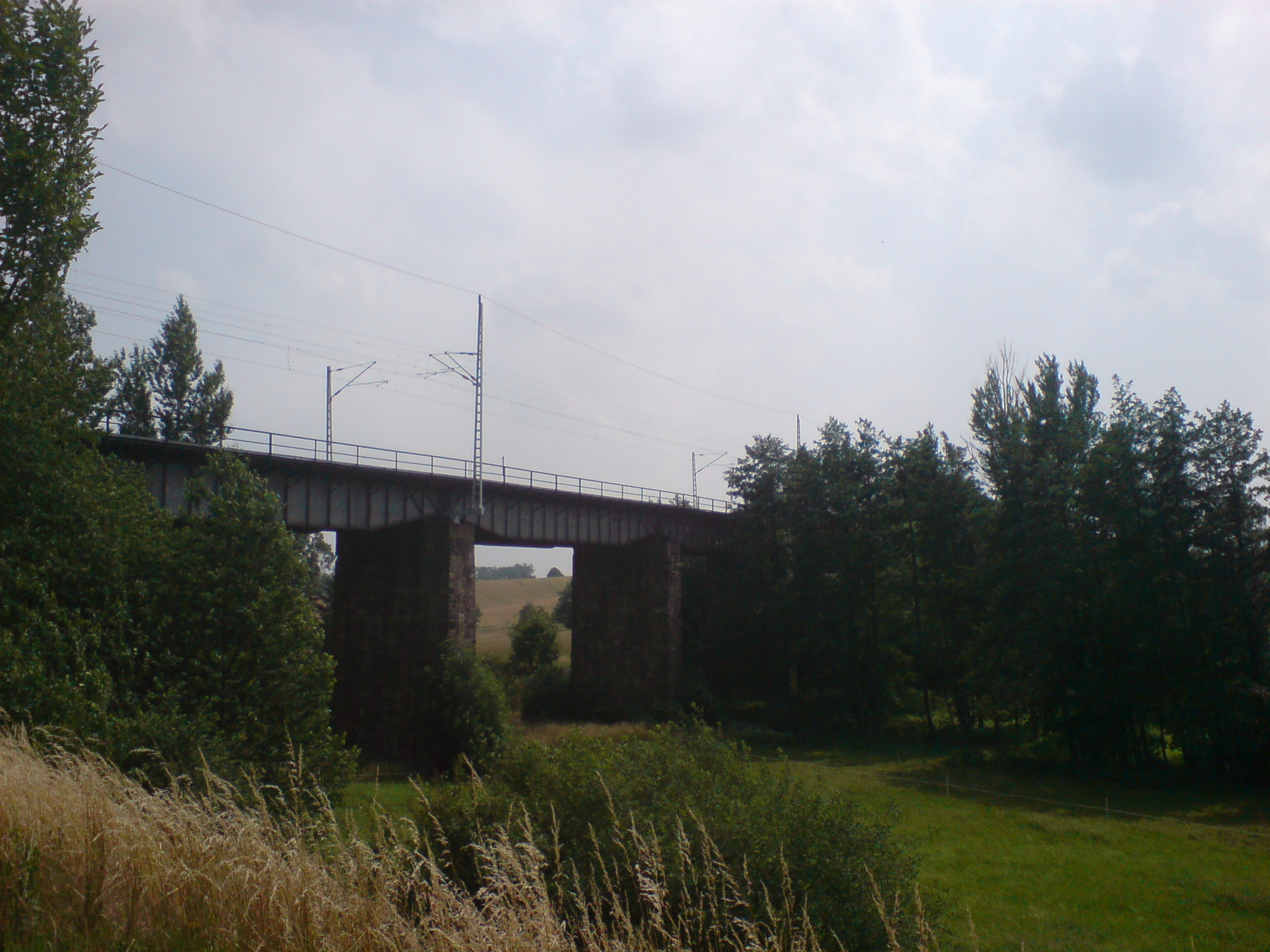 Stahlbrücke in Ostrau (Sachs.)